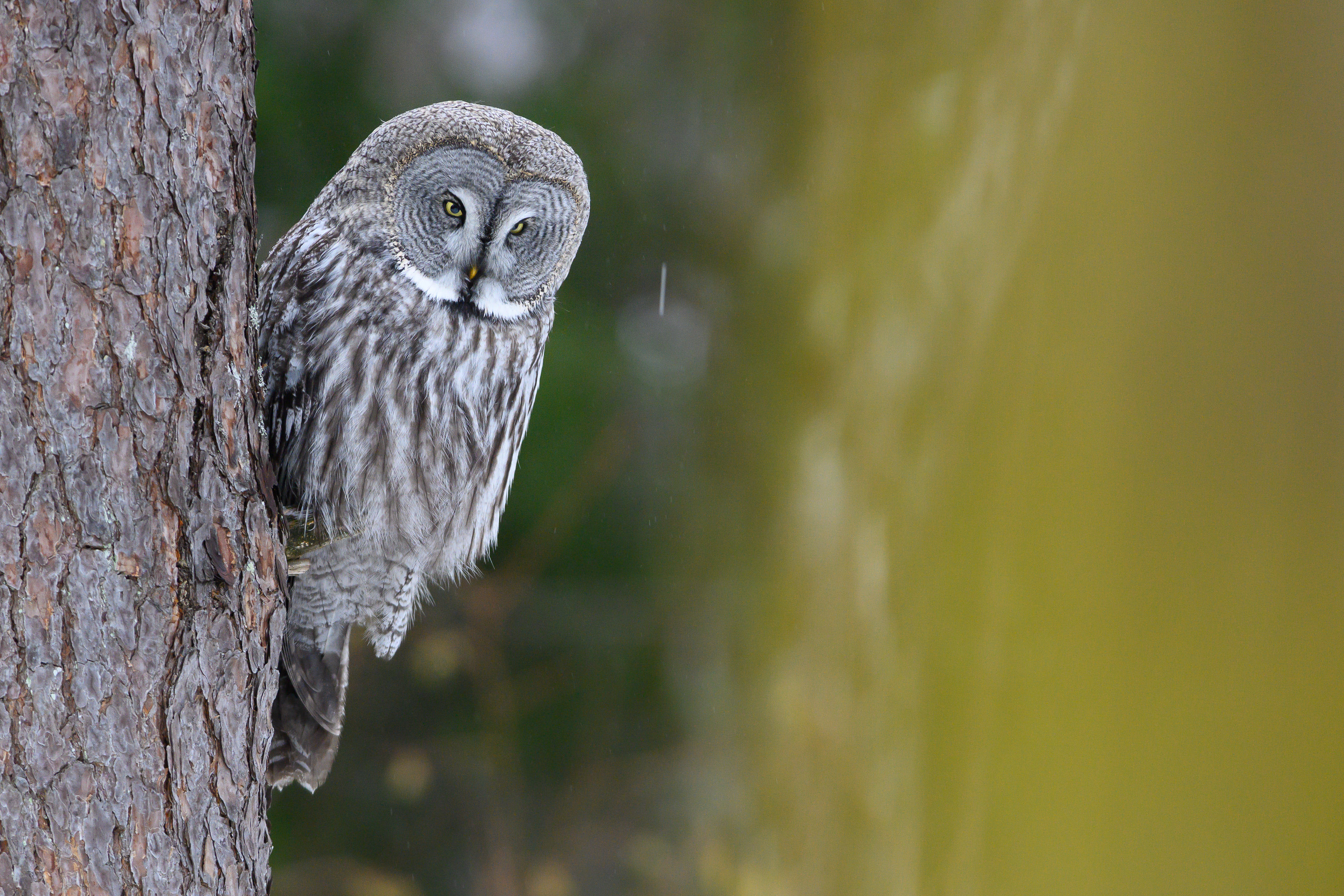 Lappugle i Moss i Østfold